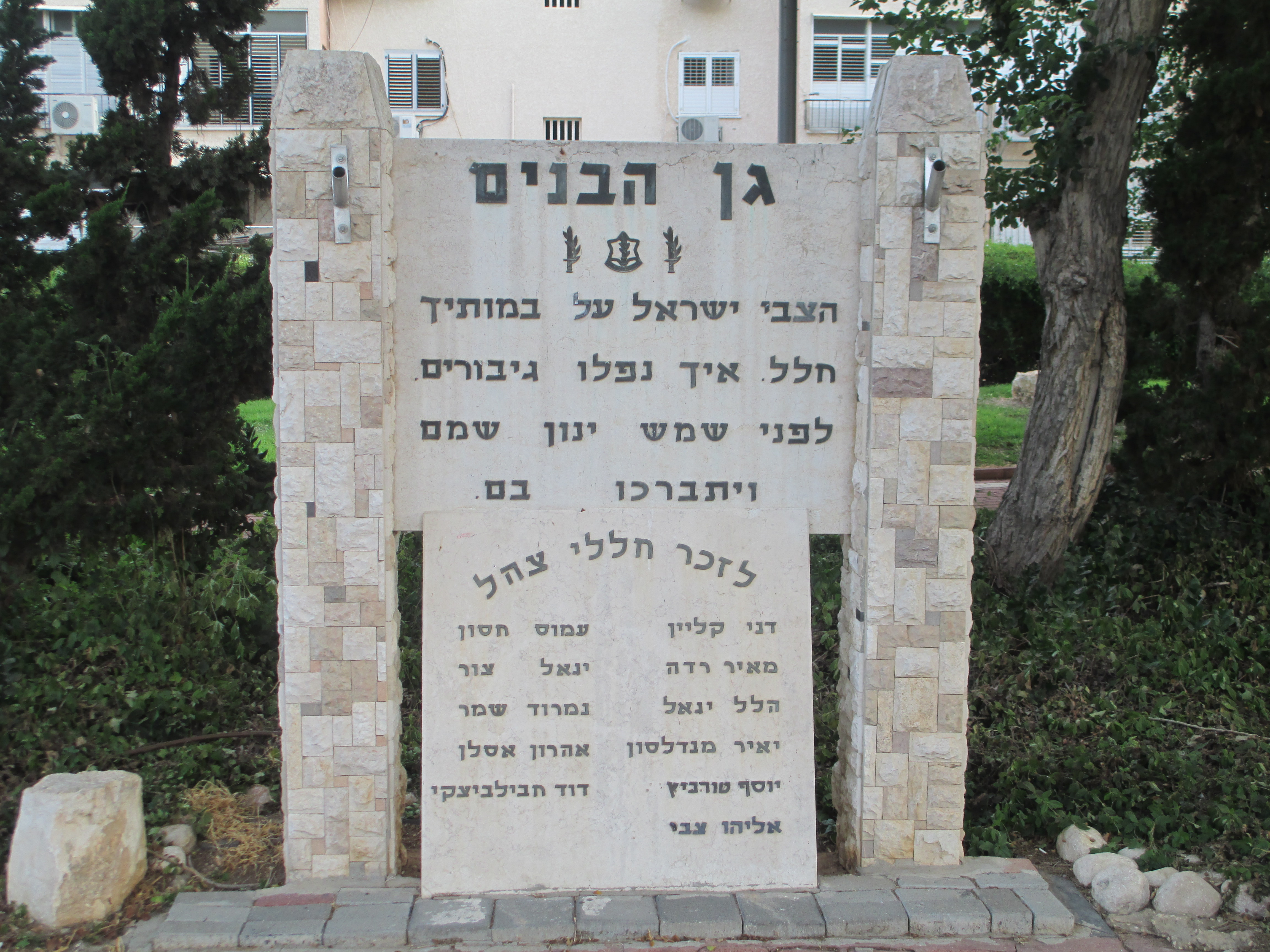 אנדרטה בגן הבנים בשכונת נווה צה"ל בתל אביב